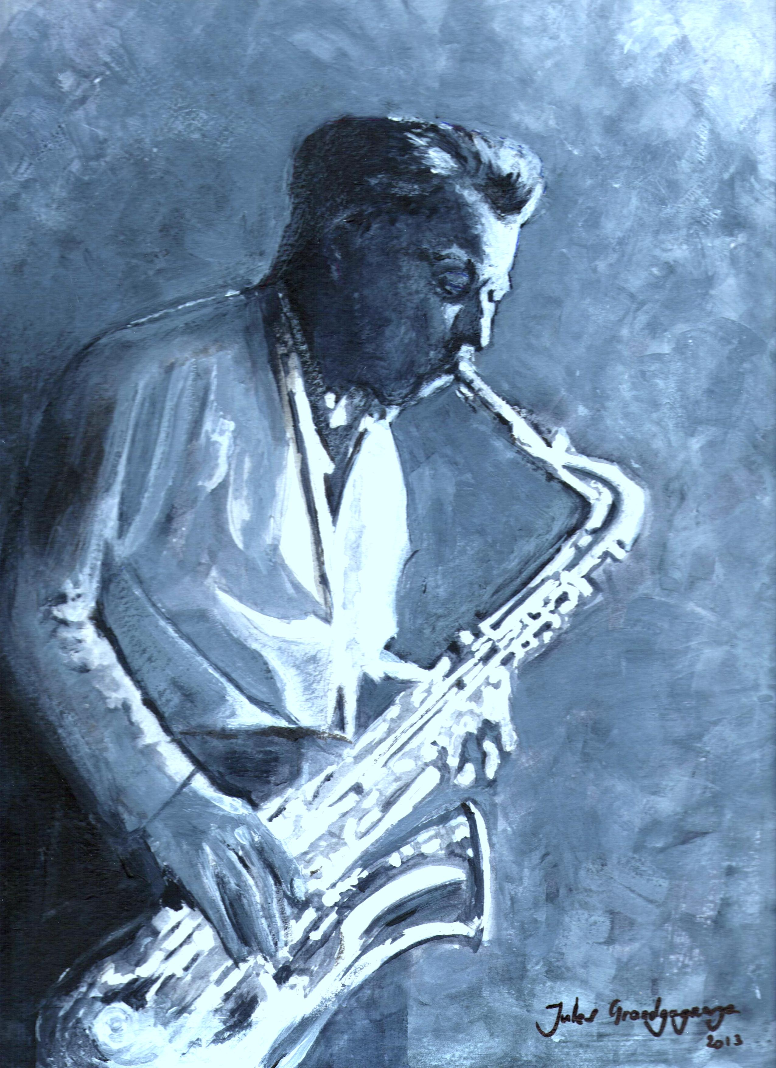 Portrait of the Belgian jazz saxophonist Jack Sels - acrylic painting by Jules Grandgagnage.